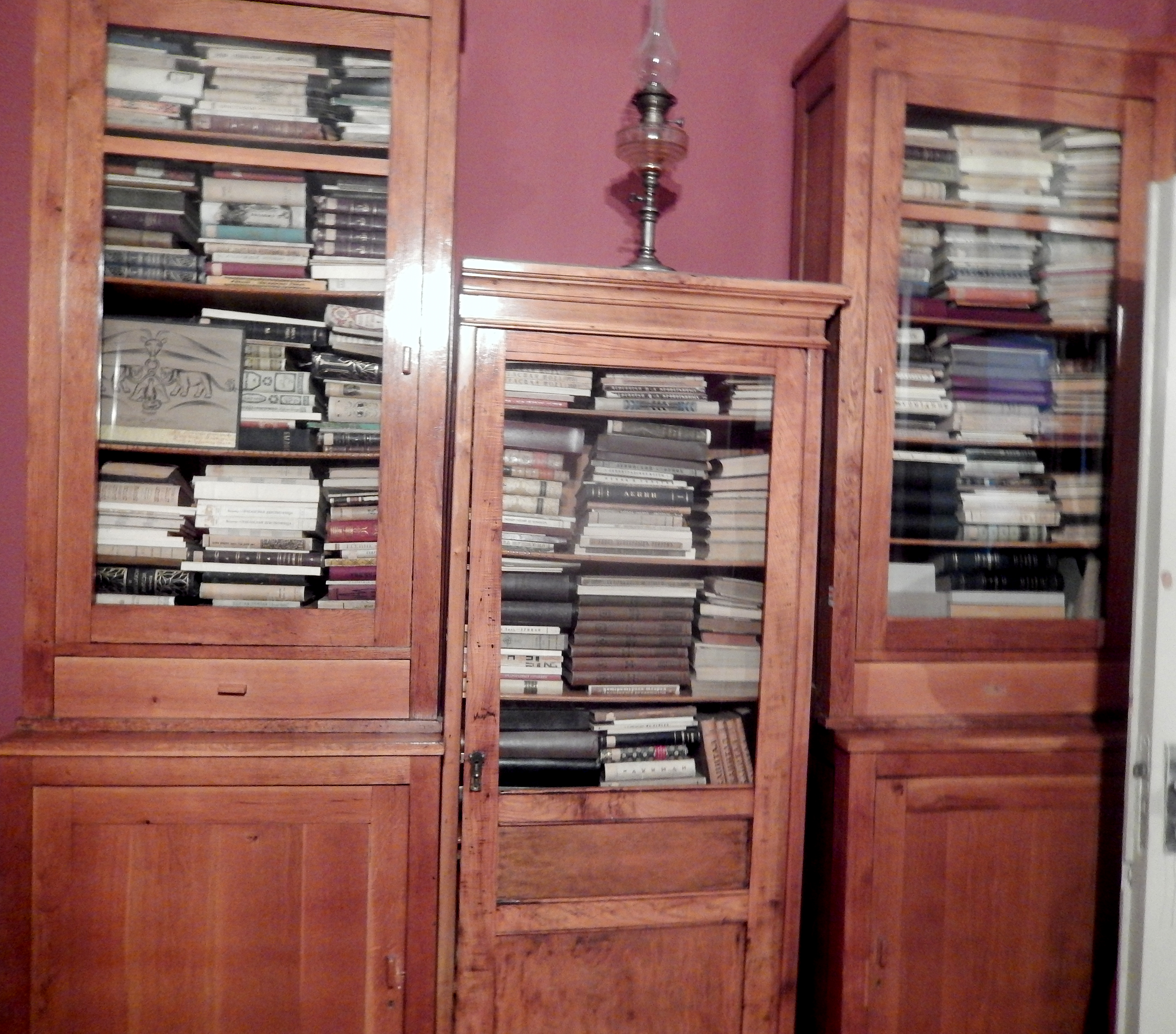 Yeghishe Charents' private Library